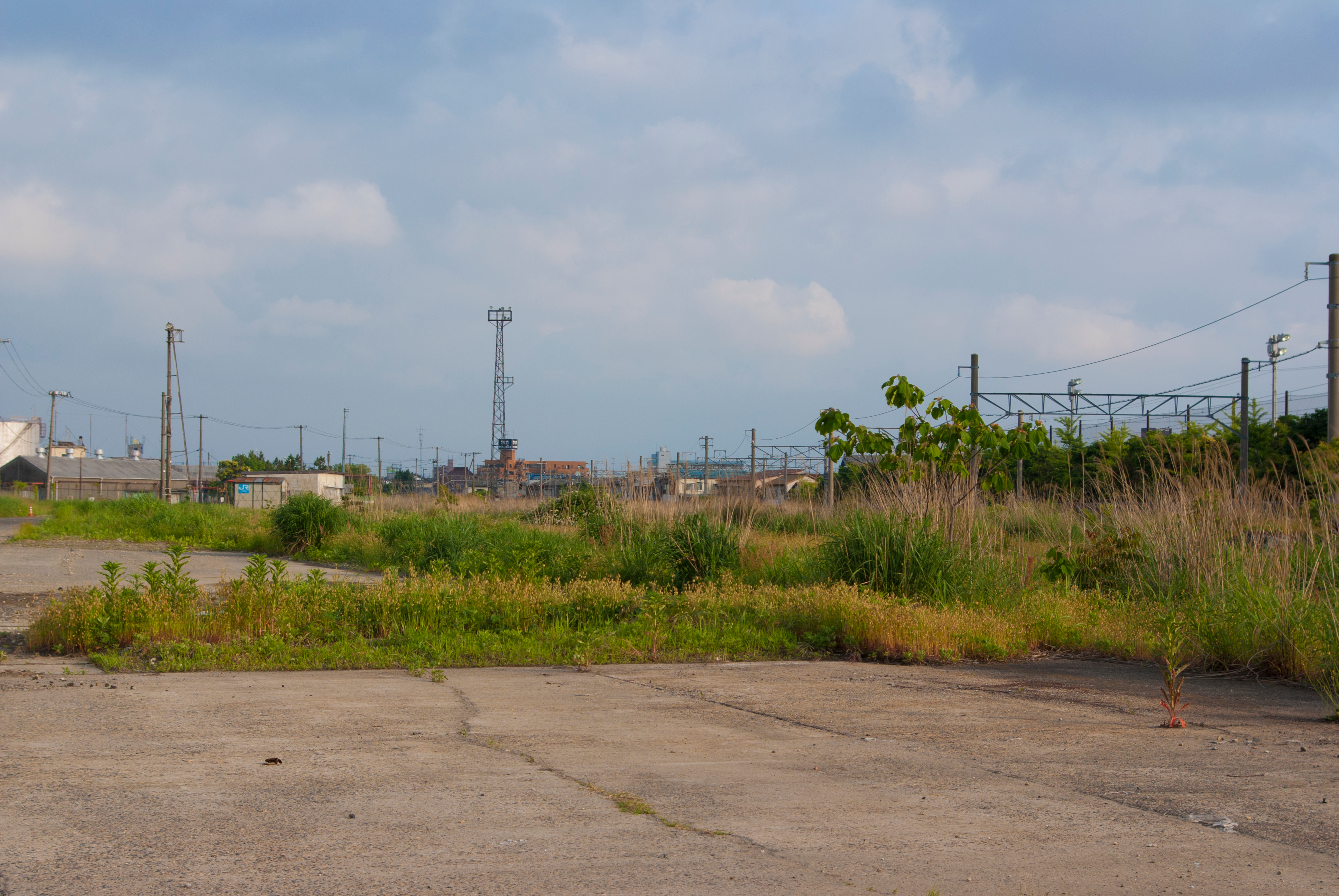 日本貨物鉄道株式会社沼垂駅